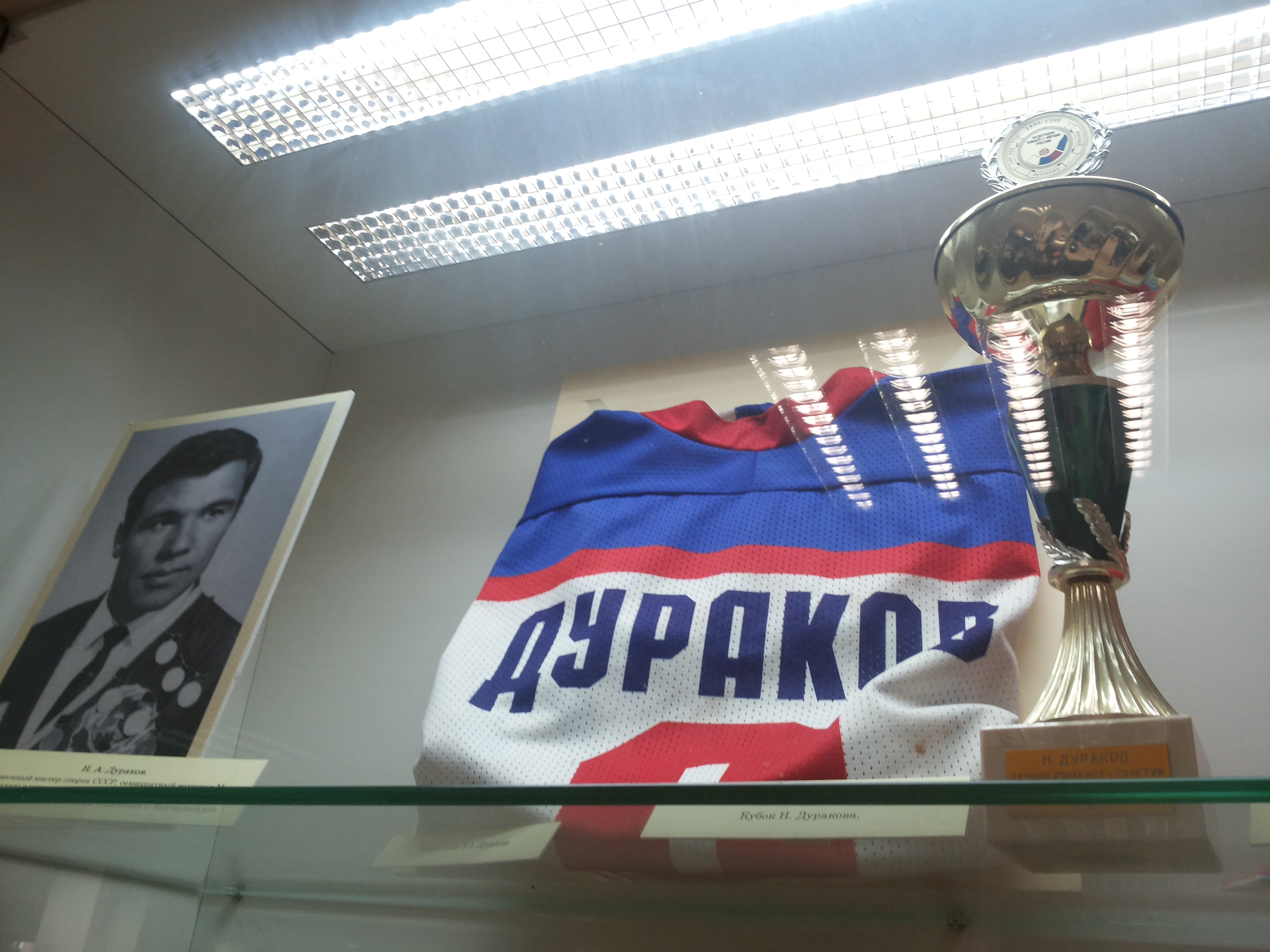 Музей истории спорта Центрального стадиона (Екатеринбург)